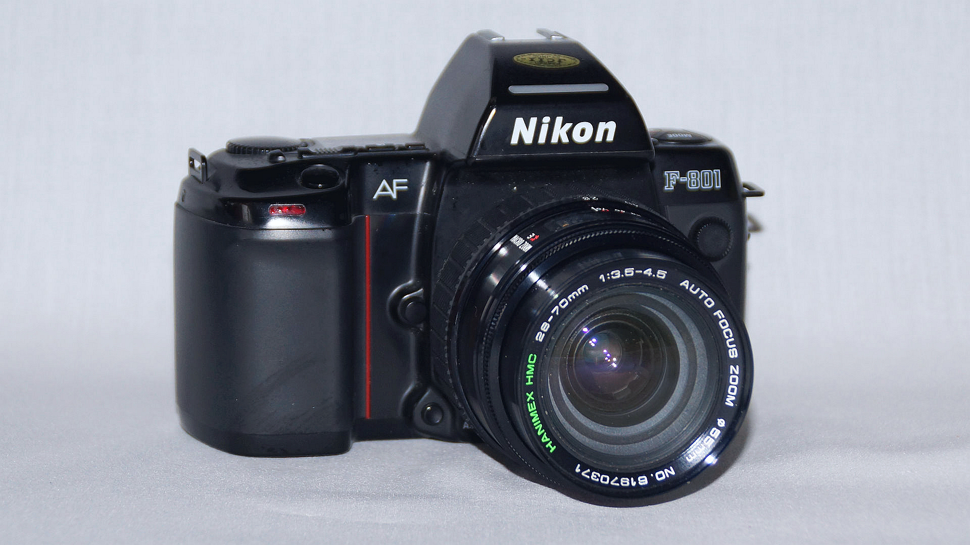 Nikon F-801 mit AF Zoom 1:3.5-4.5/28-70mm, Foto 2019 Wolfgang Pehlemann DSC04842.jpg